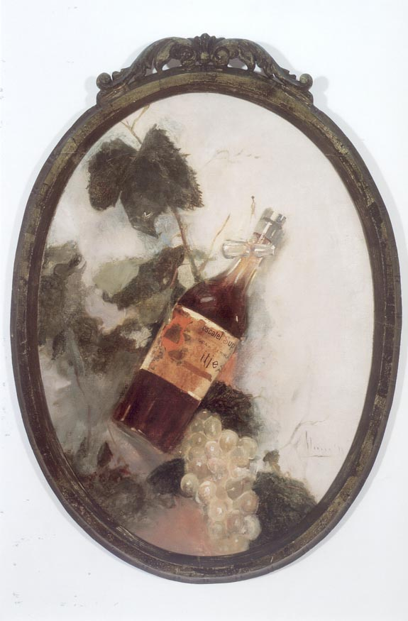 Pintura d'Antoni Almirall i Romagosa